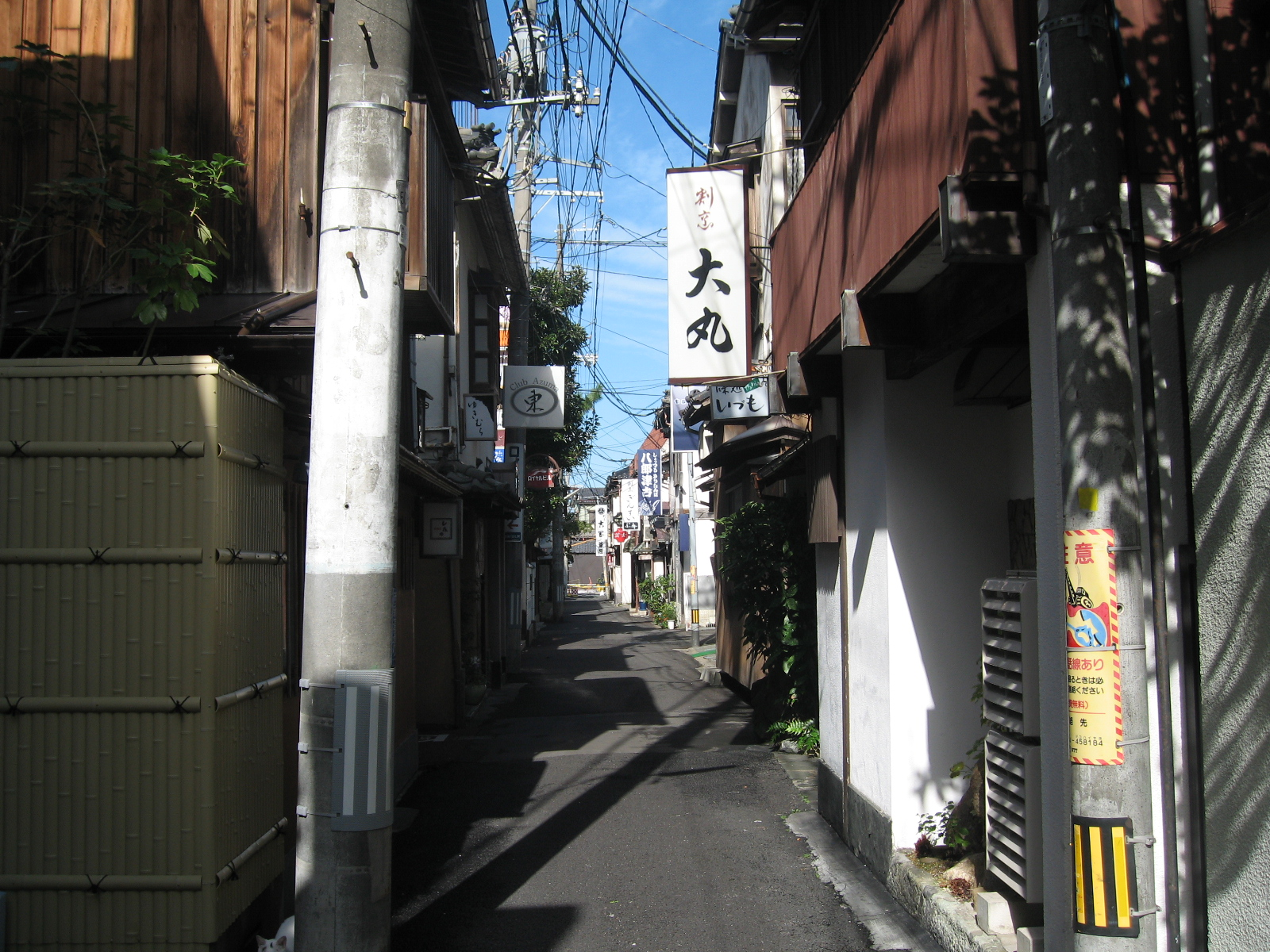 新潟市中央区。古町9番町西新道の画像。